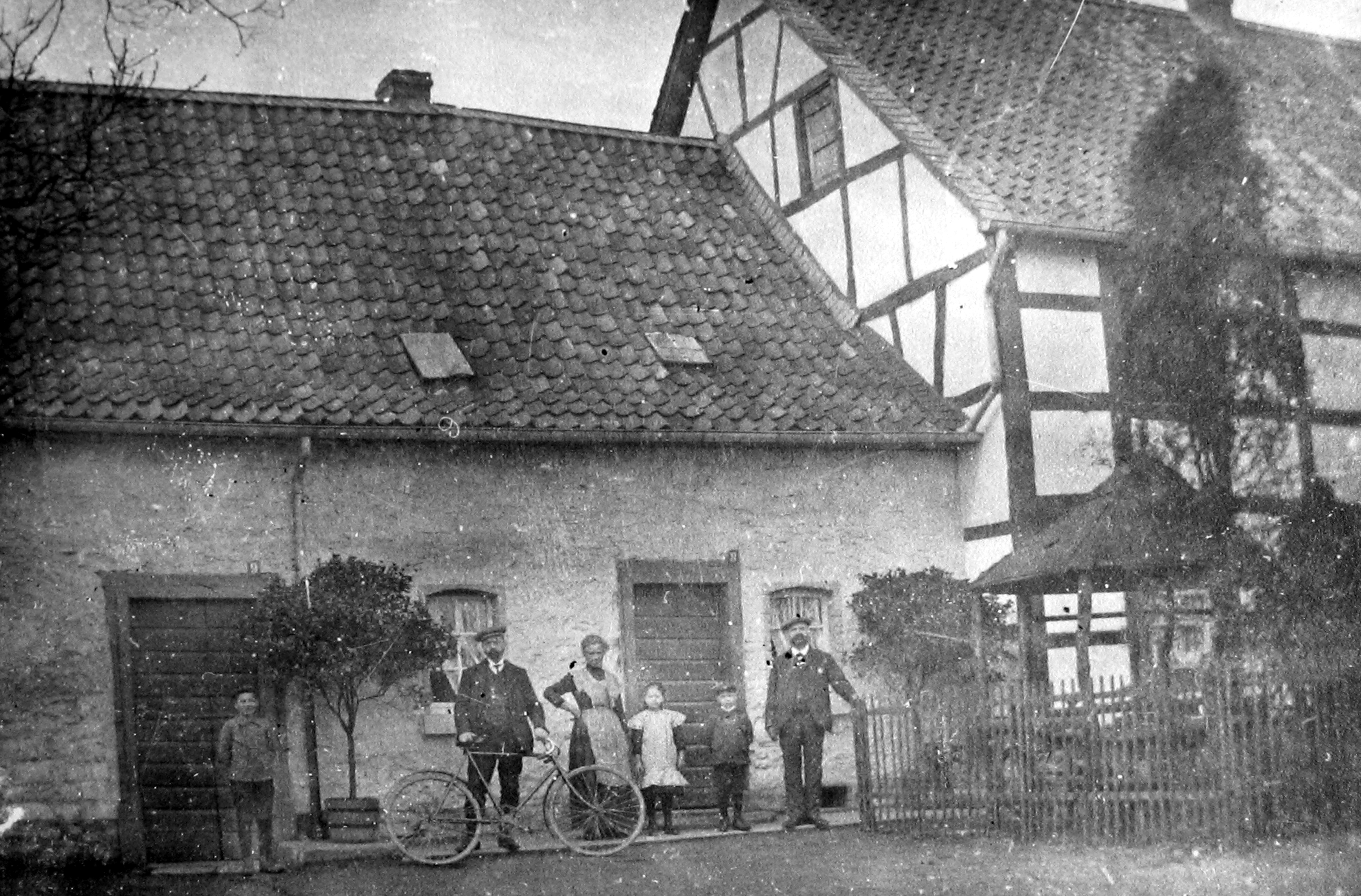 Der alte Dünnhof um 1912